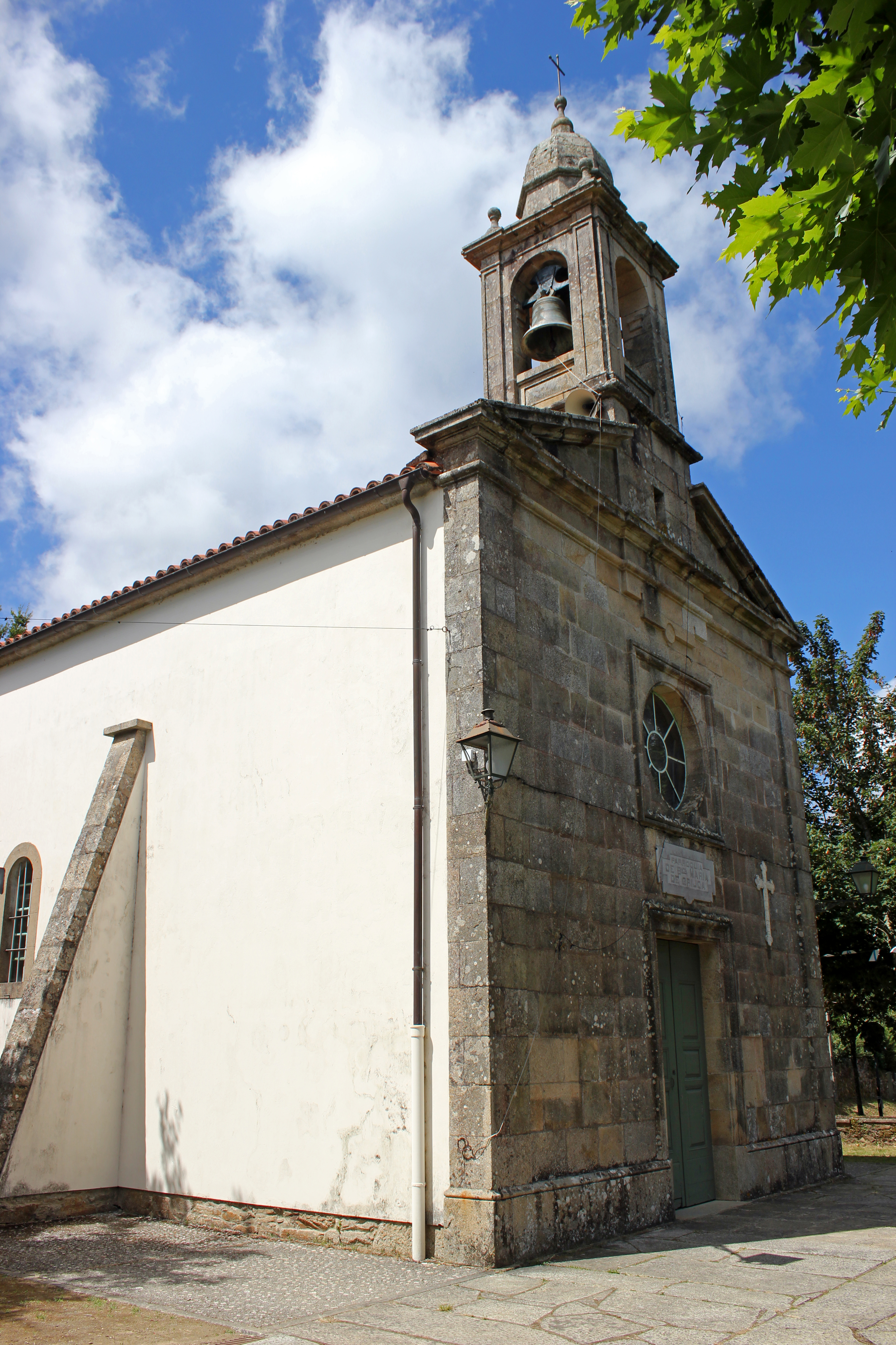 Igrexa de Grixoa, Santiago de Compostela.